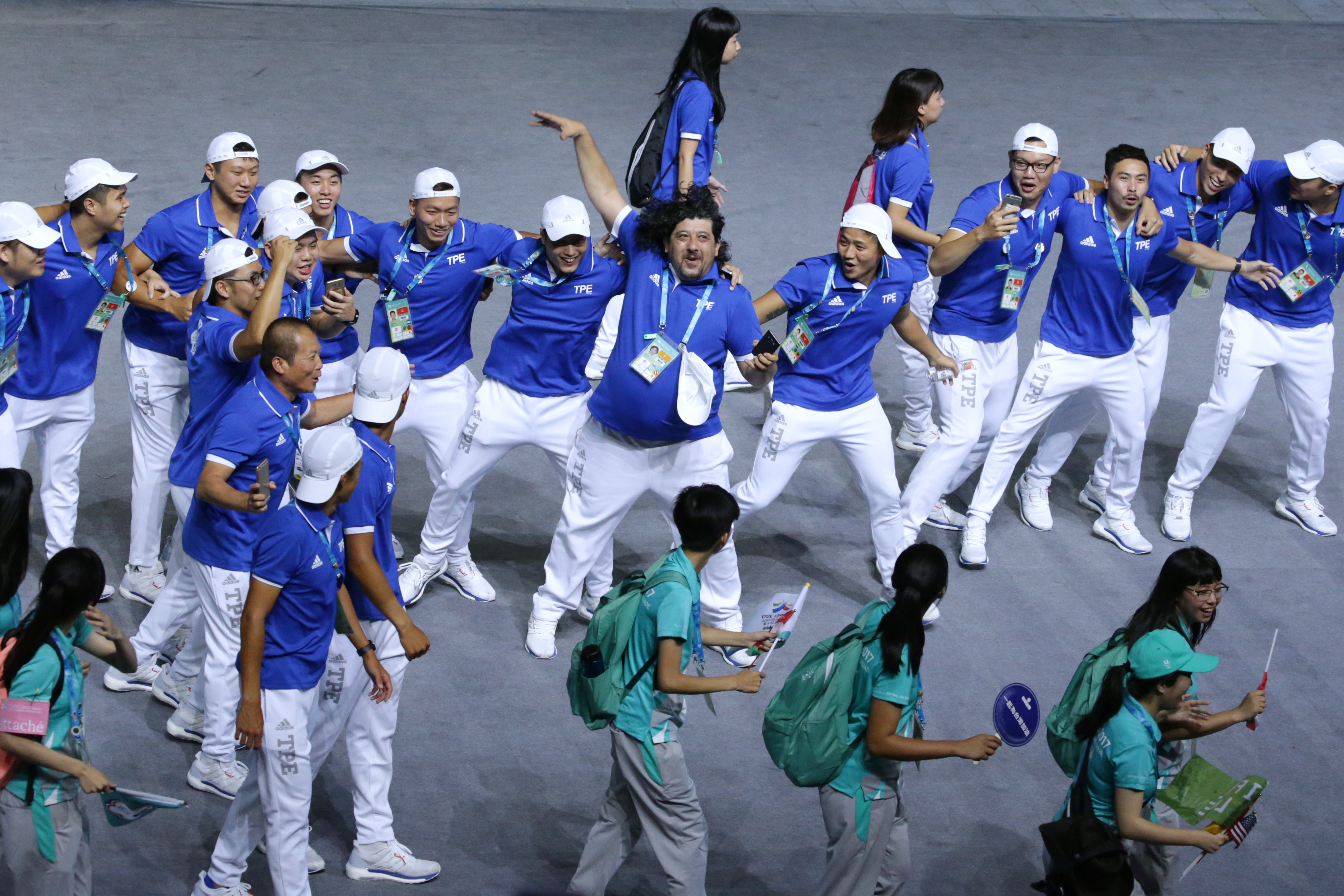 08.19 2017年世界大學運動會開幕典禮，各國選手代表與會旗進場